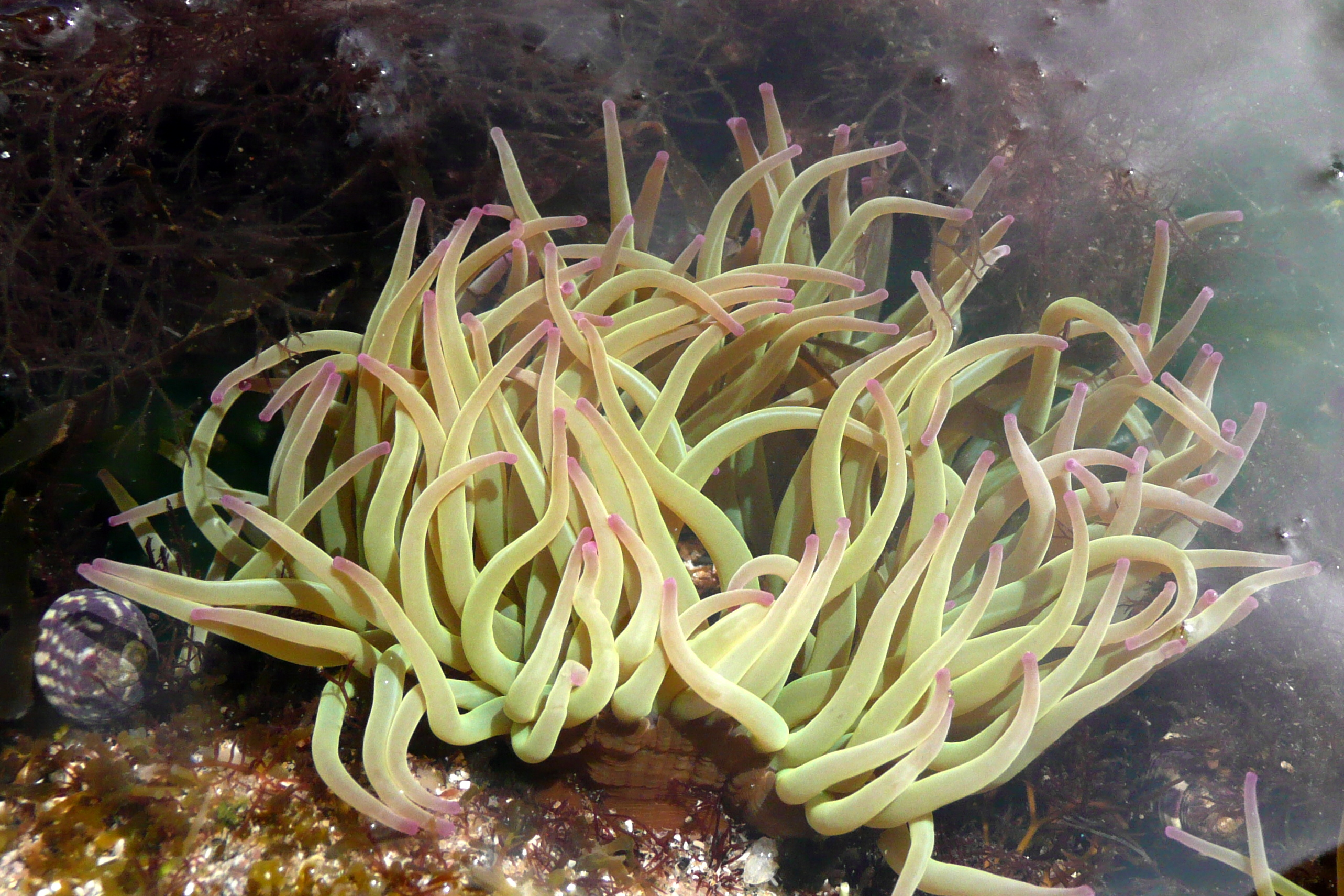 Anemone de mer Anemonia viridis. Ile de Groix (France) dans une flaque à marée basse.